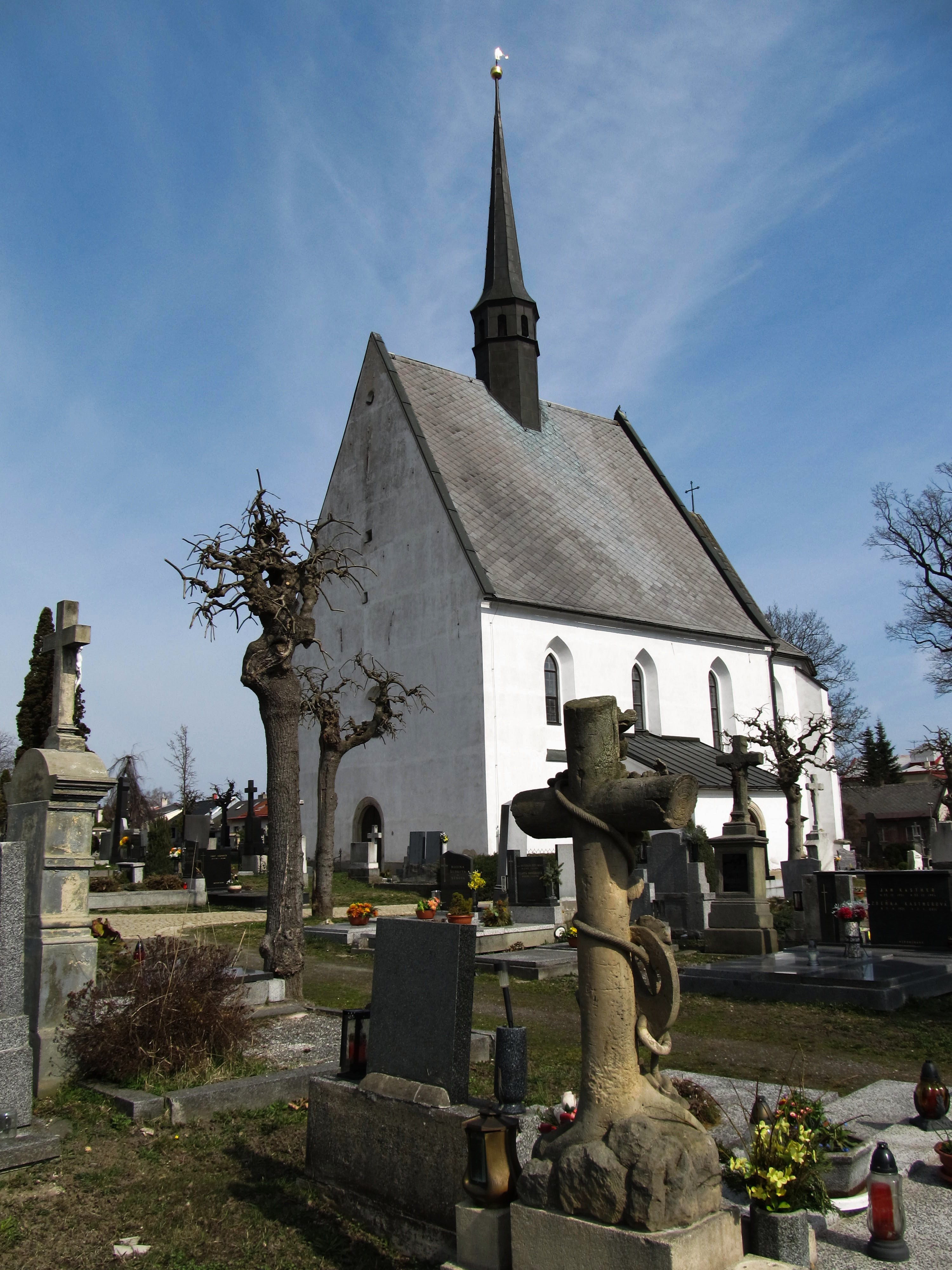 Renesanční hřbitovní kostel sv. Michaela archanděla v Poličce (1572-1576), pohled od jihozápadu